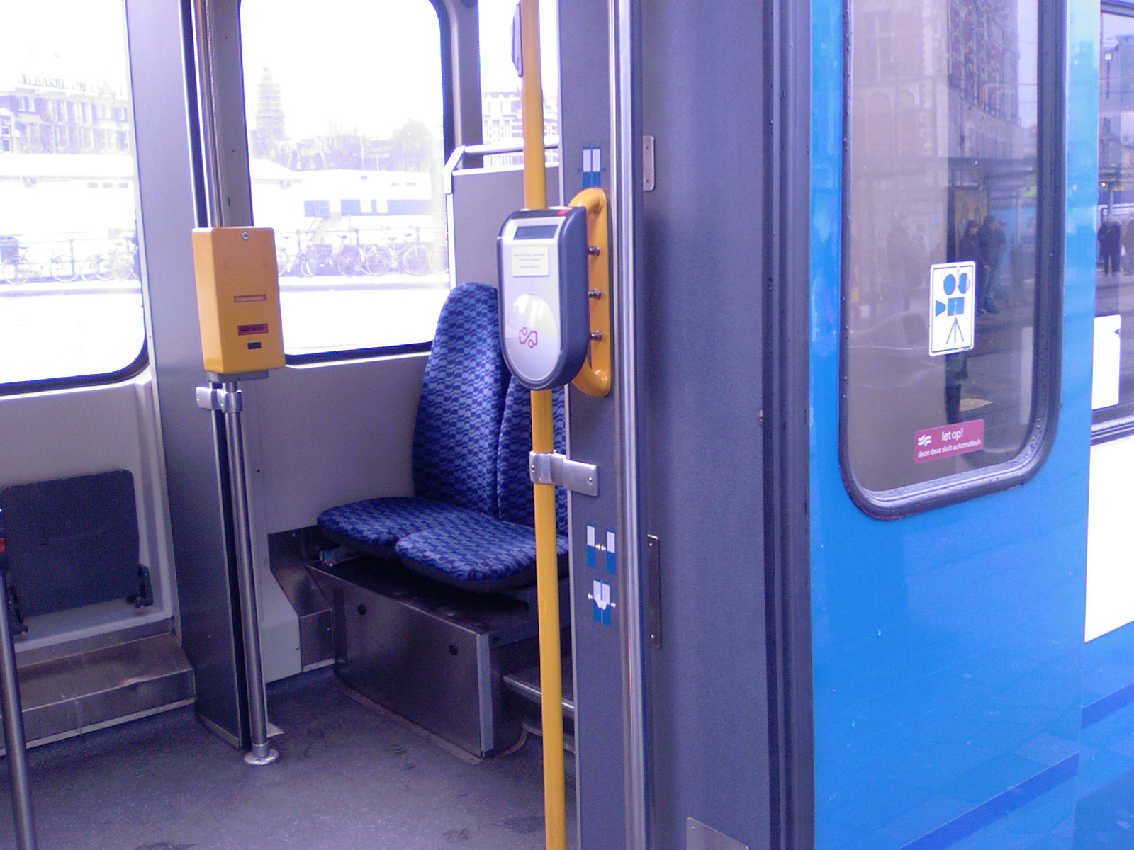 Chipkaartlezer nieuwe generatie in een tram van het GVB Amsterdam